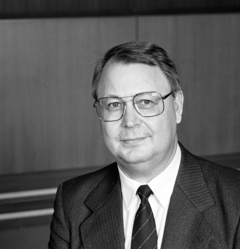 18.12.1989 Klaus Winter Richter am Bundesverfassungsgericht II. Senat